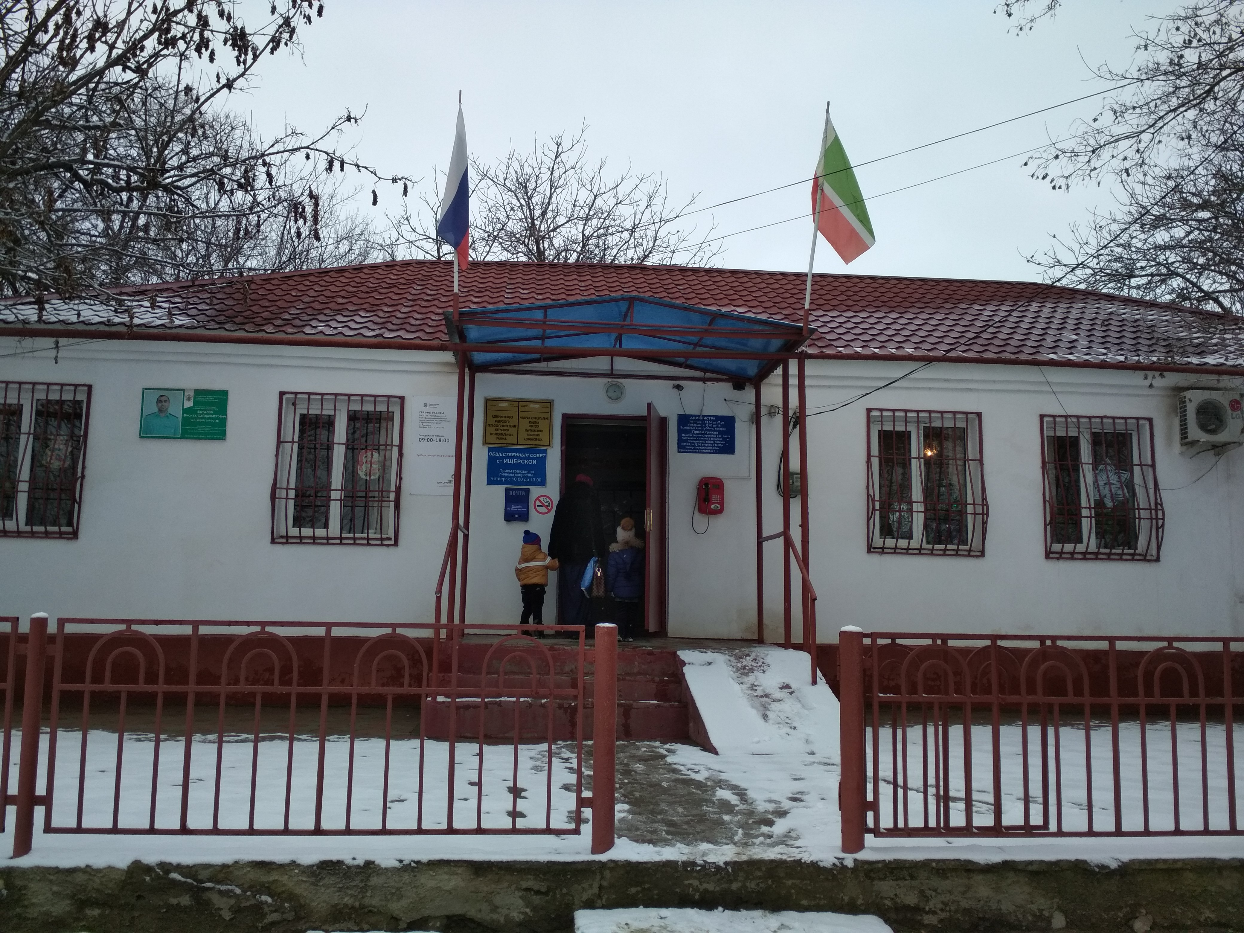 Нохчийн: Ишорен администраци